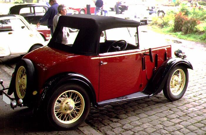 GNU-Lizenz & Eigenes Foto